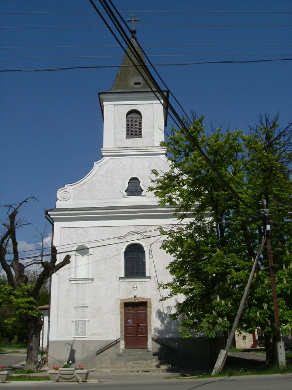 Pilisszentkereszti Szent Kereszt római katolikus templom